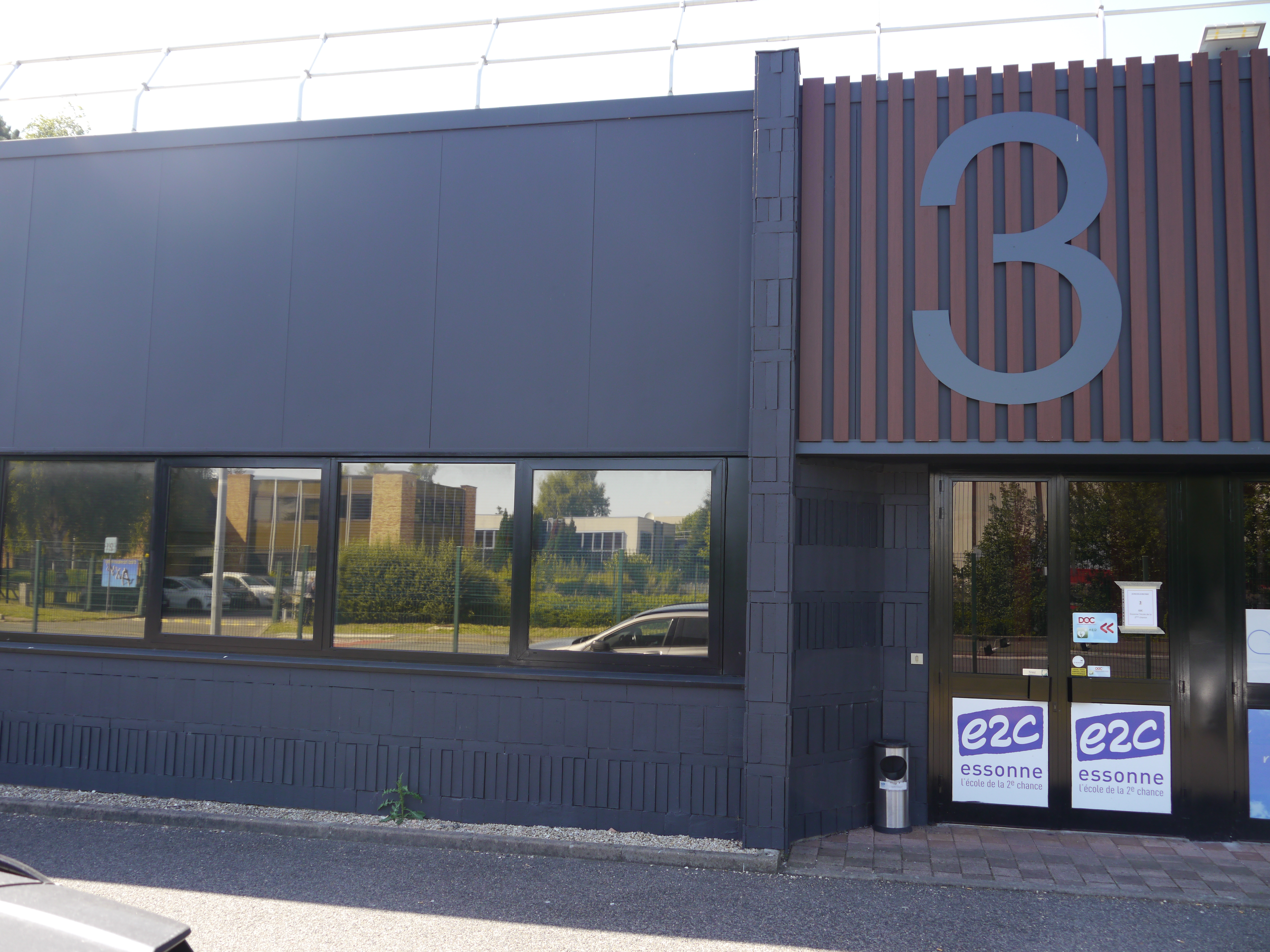 Site de l'Ecole de la 2ème chance en Essonne dans le parc d'activités de Courtaboeuf